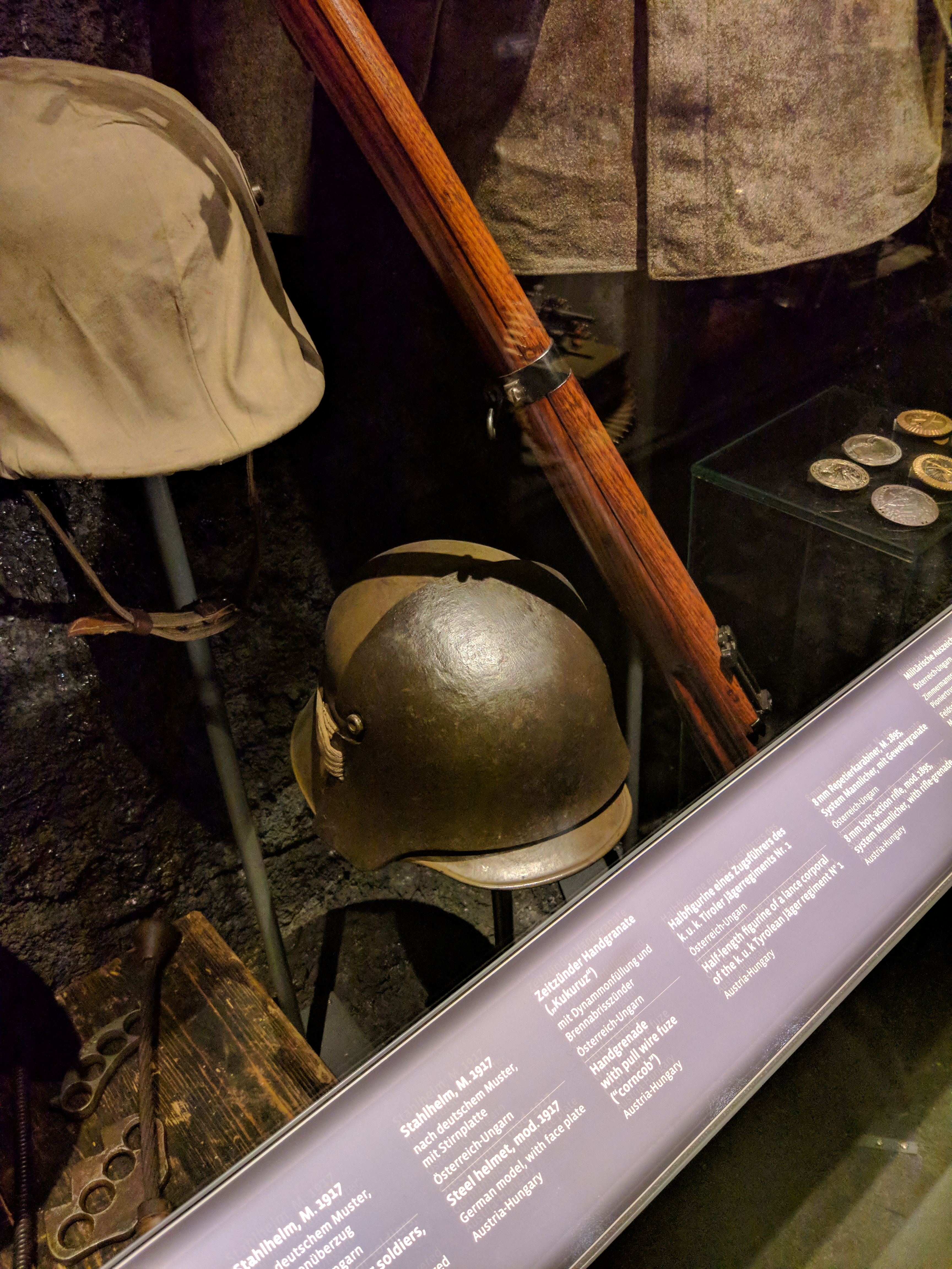 Čelada Stahlhelm s čelnim ščitom Stirnpanzer